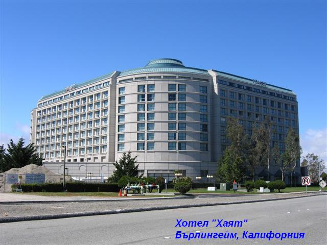 Хотел "Хаят" до залива, Бърлингейм (авторска снимка)